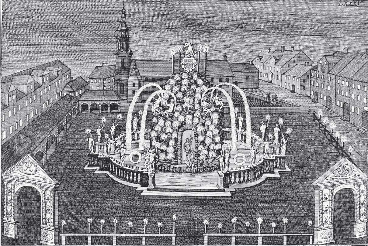 Der illuminierte Neustädter Markt mit dem Parnaßbrunnen in der Calenberger Neustadt bei Hannover; 1727 gezeichnet und gestochen von Johann Anton de Klyher